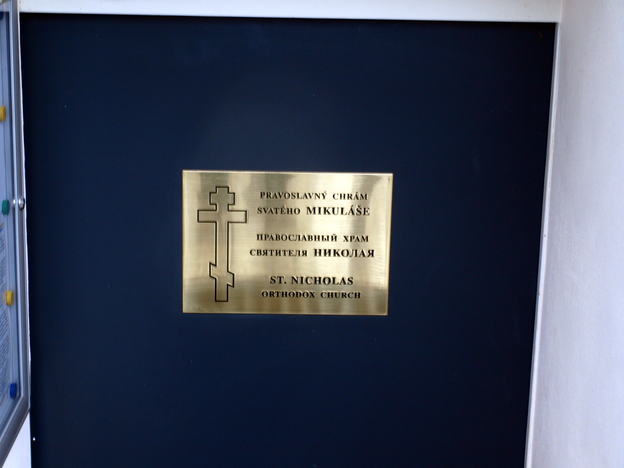 Dejvice, chrám sv. Mikuláše cedule